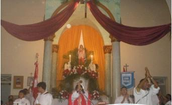 Altar da Capela de Santa Maria Goretti